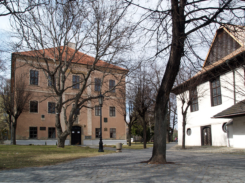 Kežmarok - Evanjelické lýceum a drevený artikulárny Kostol Najsvätejšej Trojice